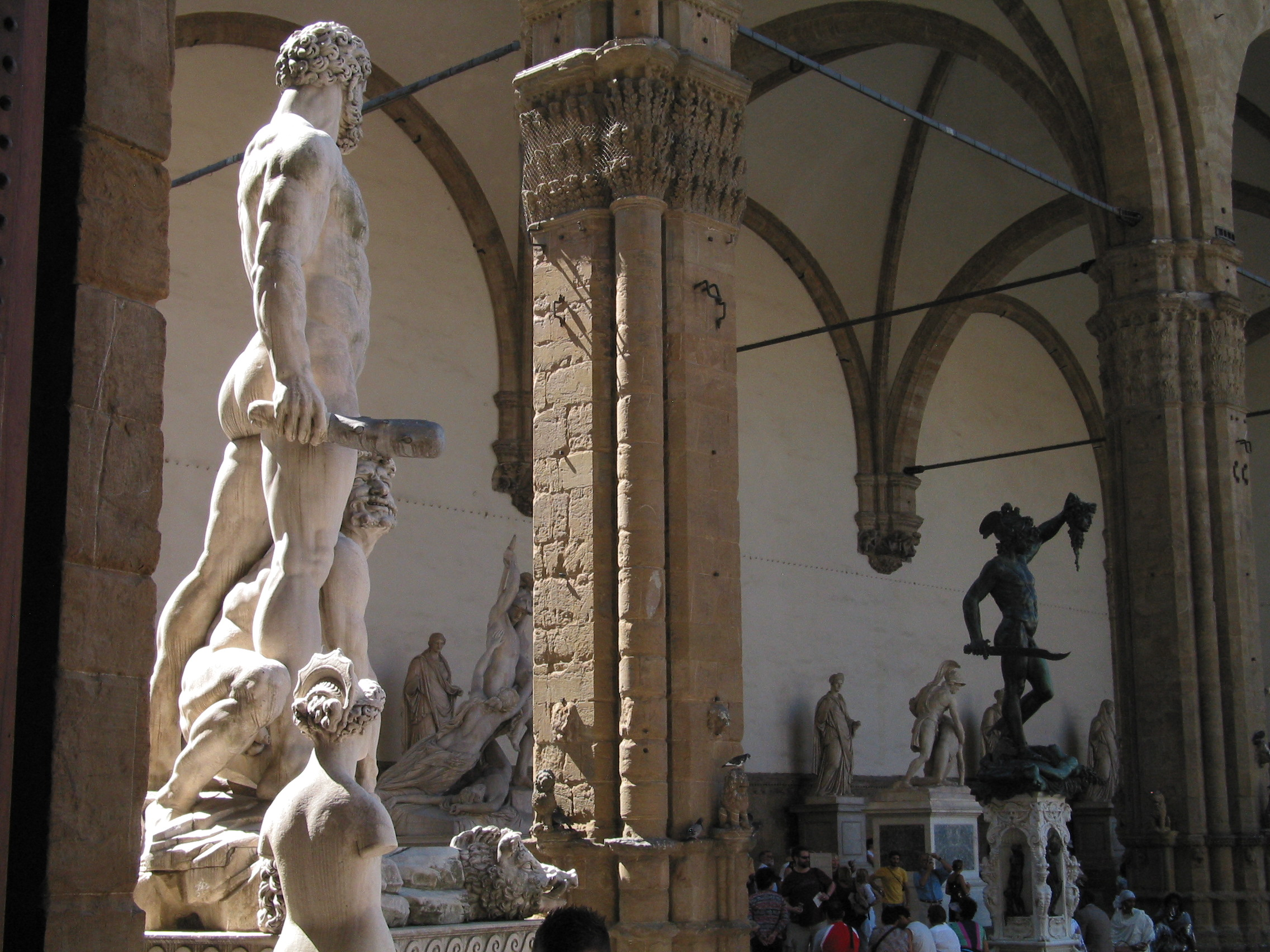 View from interior of Palazzo Vecchio to Loggia dei Lanzi in Florence, Italy